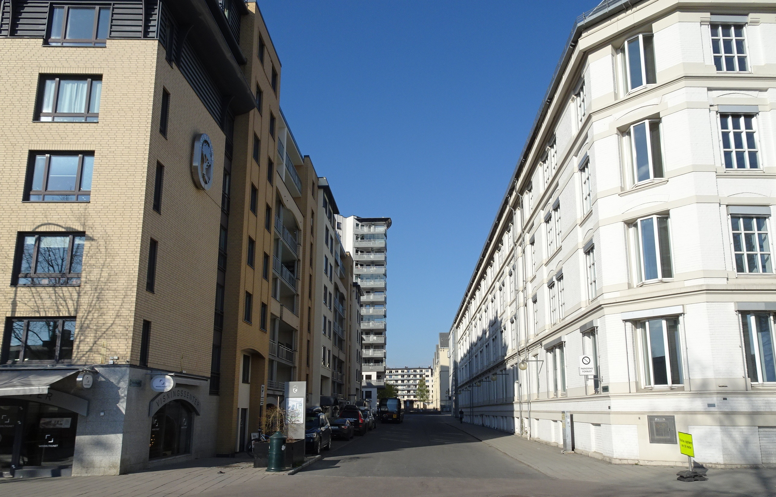 Fabrikkgata på Majorstuen